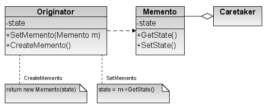 The Memento design pattern UML diagram